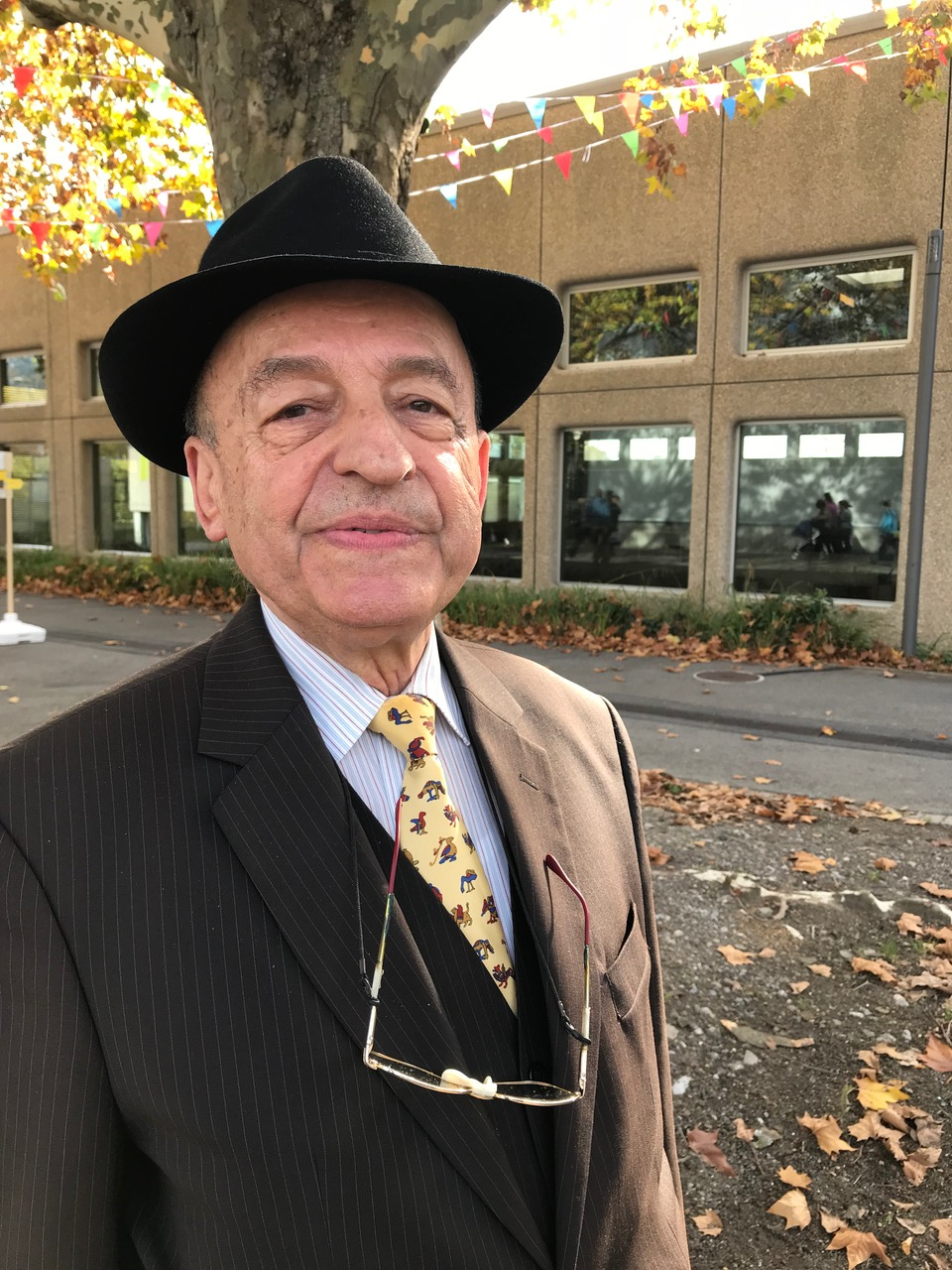 Prof. DHC Titu-Marius Băjenescu, octombrie 2017 (portret)